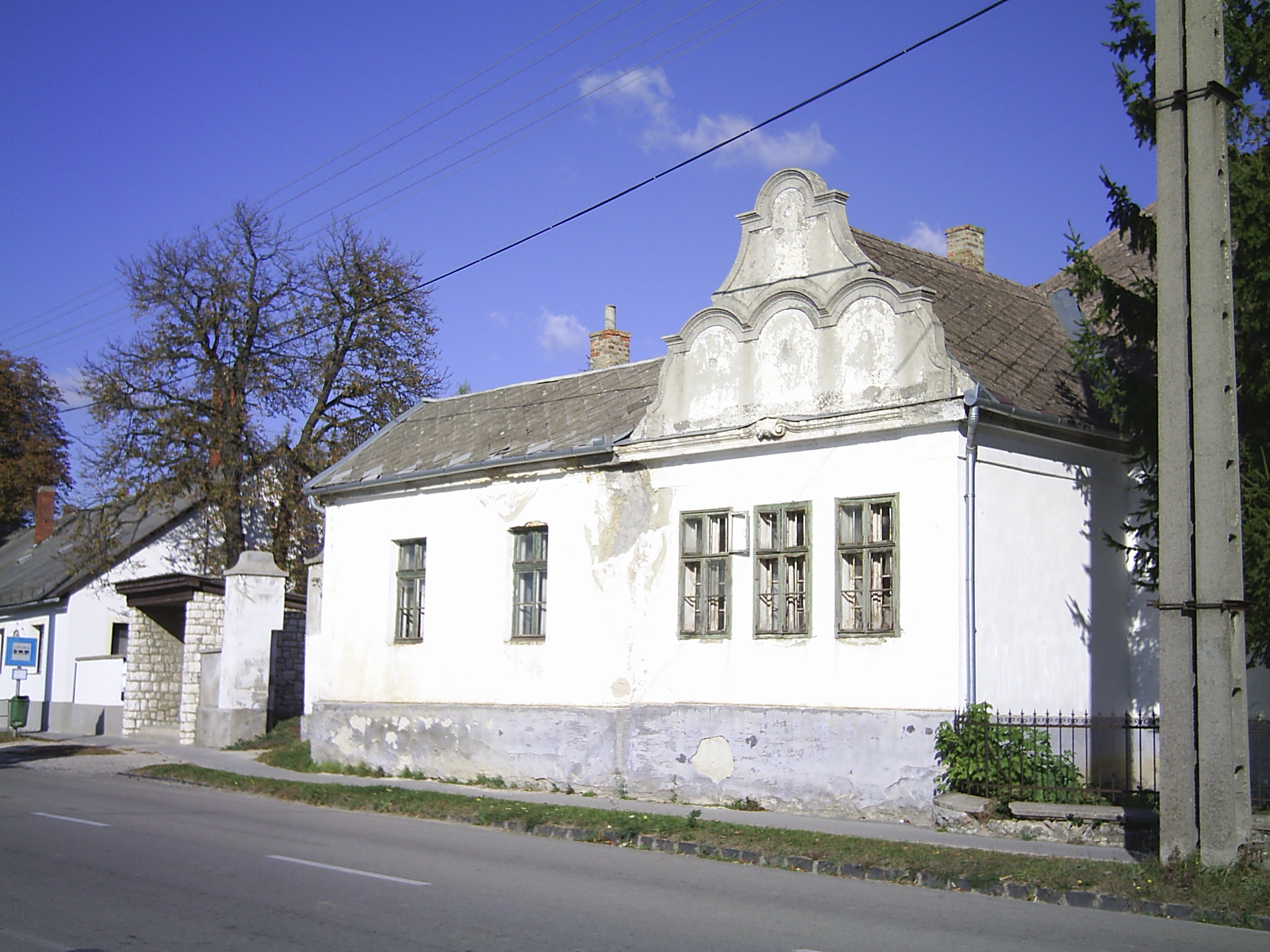 Purgli-kastély, Nagyesztergár